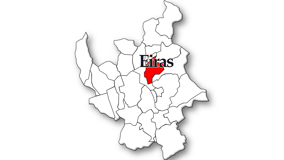 População